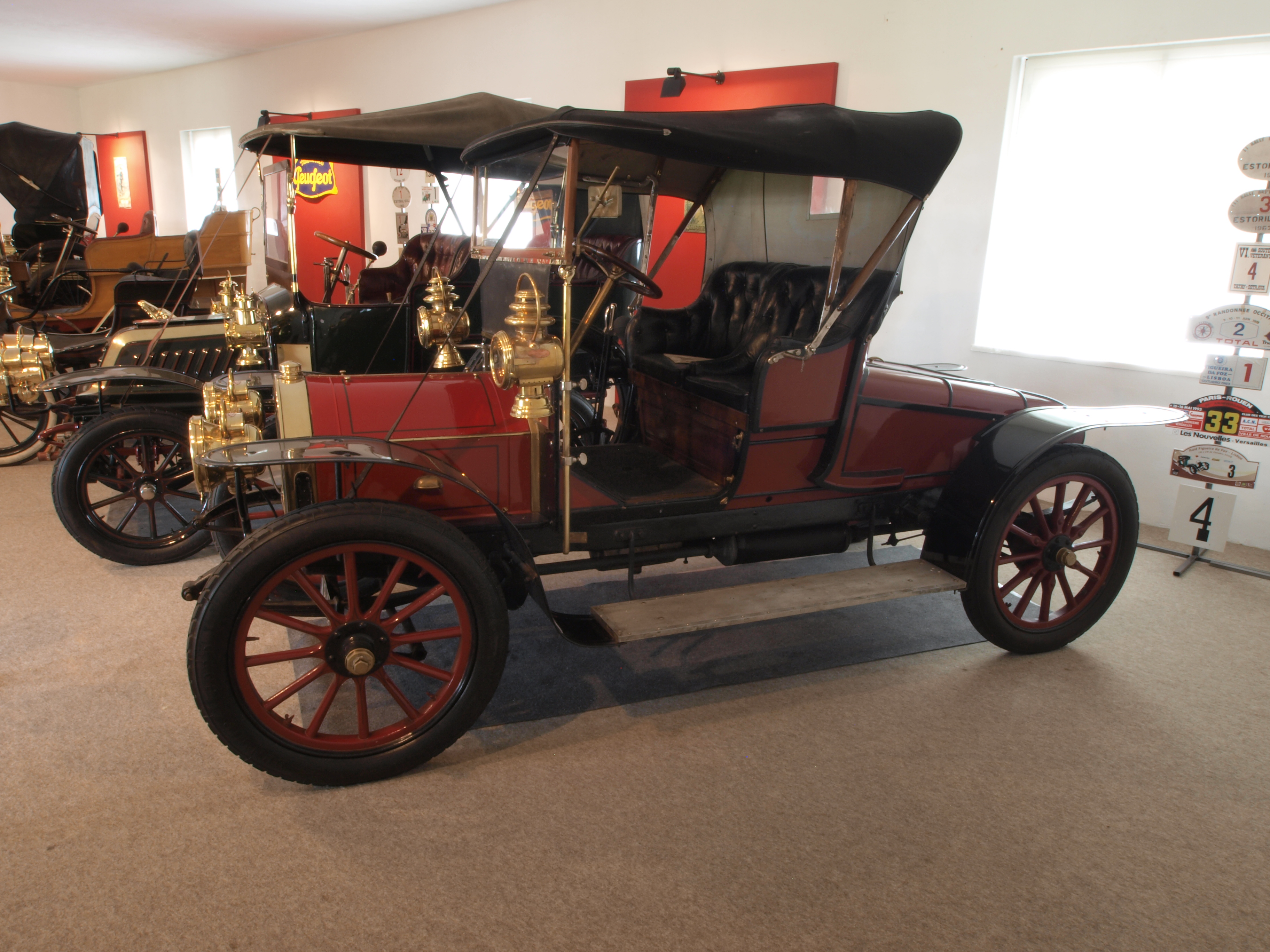 Photographed at the Caramulo museum, 'Museu do Caramulo', Caramulo, Portugal. OLYMPUS DIGITAL CAMERA